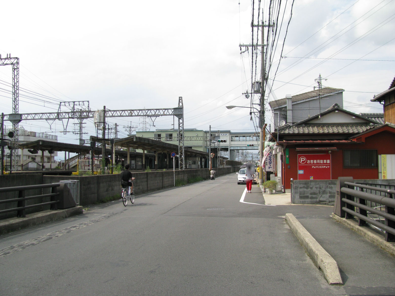 近鉄京都線向島駅